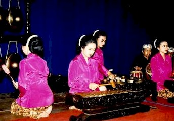 Sundanese gamelan degung ensemble, West Java, Indonesia